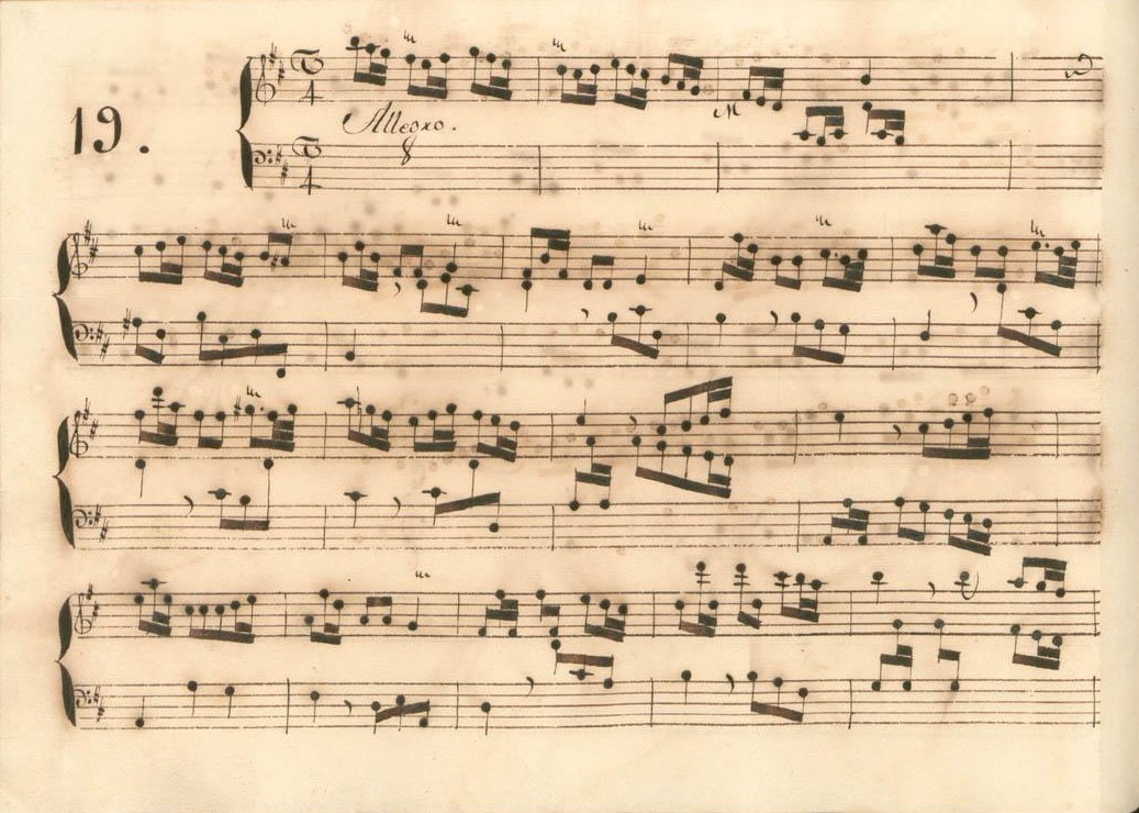 La sonate K. 376, telle qu'elle se présente dans le manuscrit de Parme, volume X no. 19.